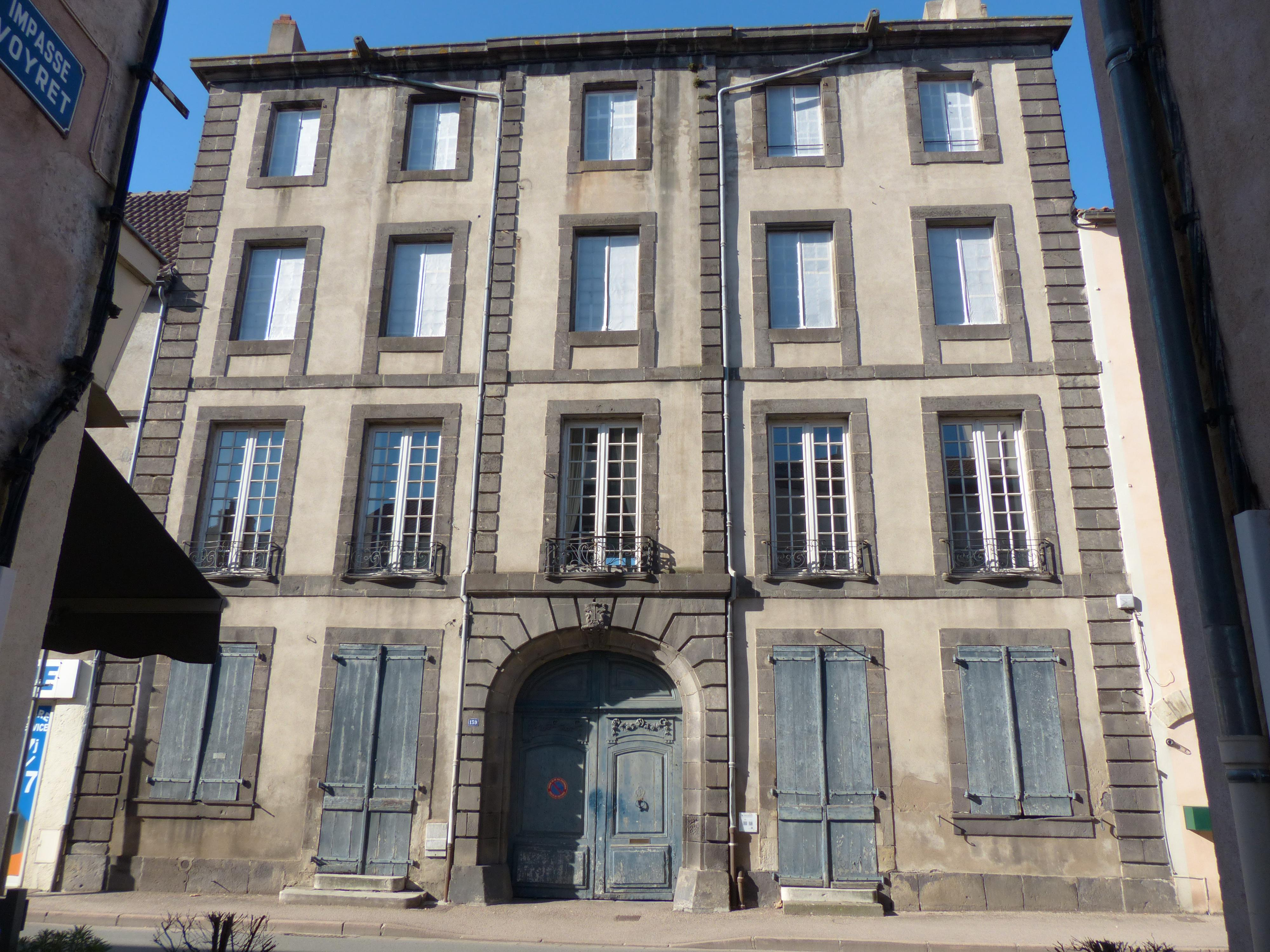 Aigueperse (Puy-de-Dôme). Hôtel Salneuve (XVIIIe siècle), sur le côté ouest de la Grande Rue.